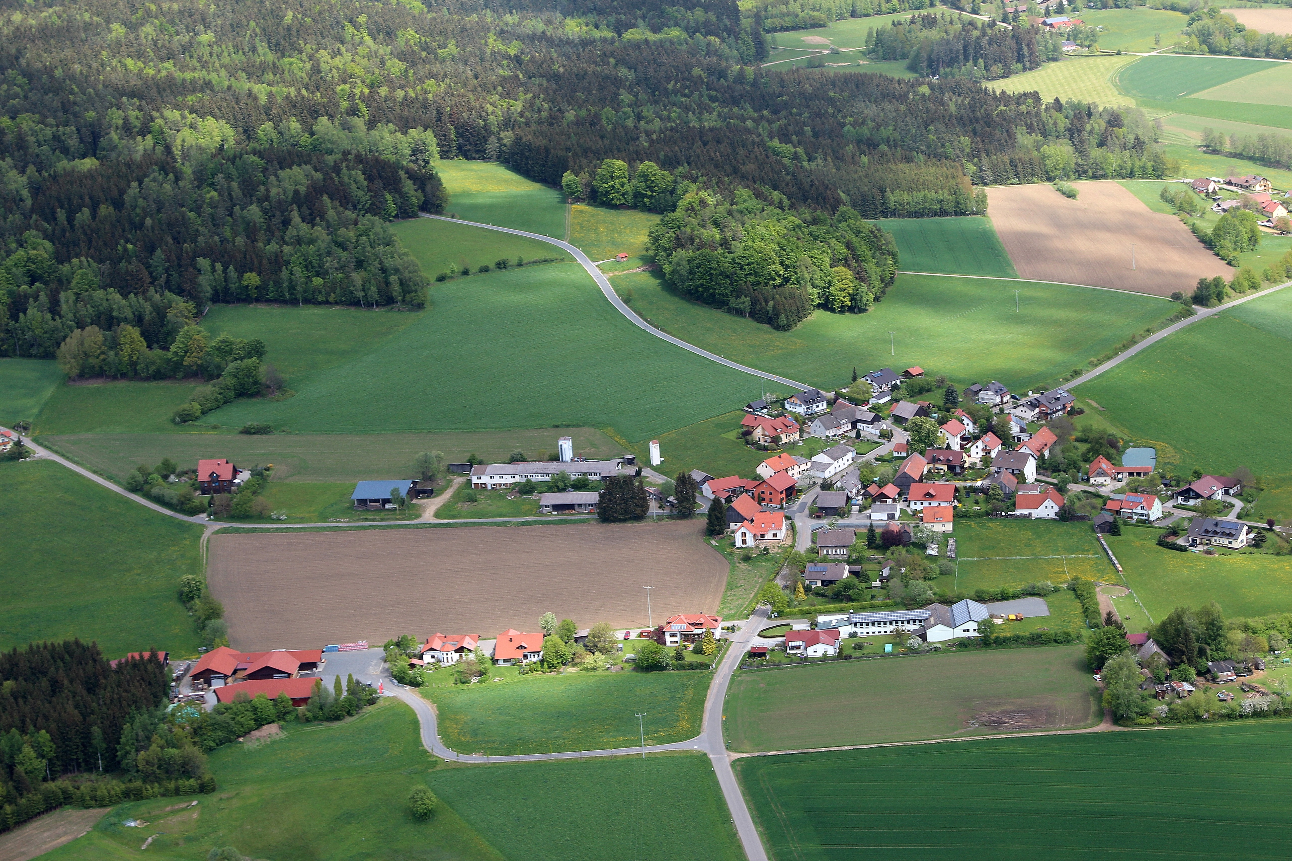 Ödmiesbach, Gemeinde Teunz, Landkreis Schwandorf, Oberpfalz, Bayern (2015)